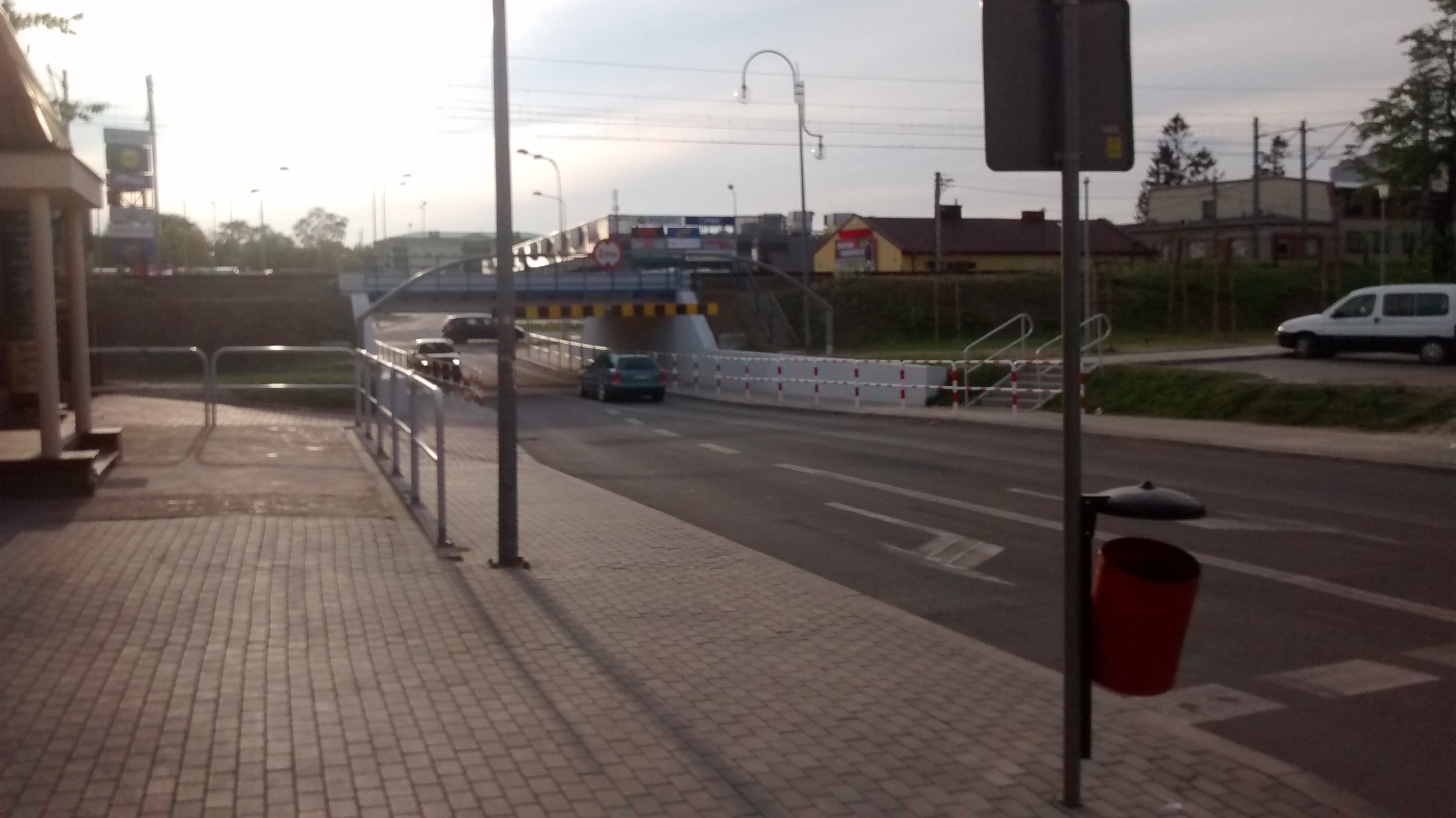 Ulica łącząca Sierakowskiego z Reymonta